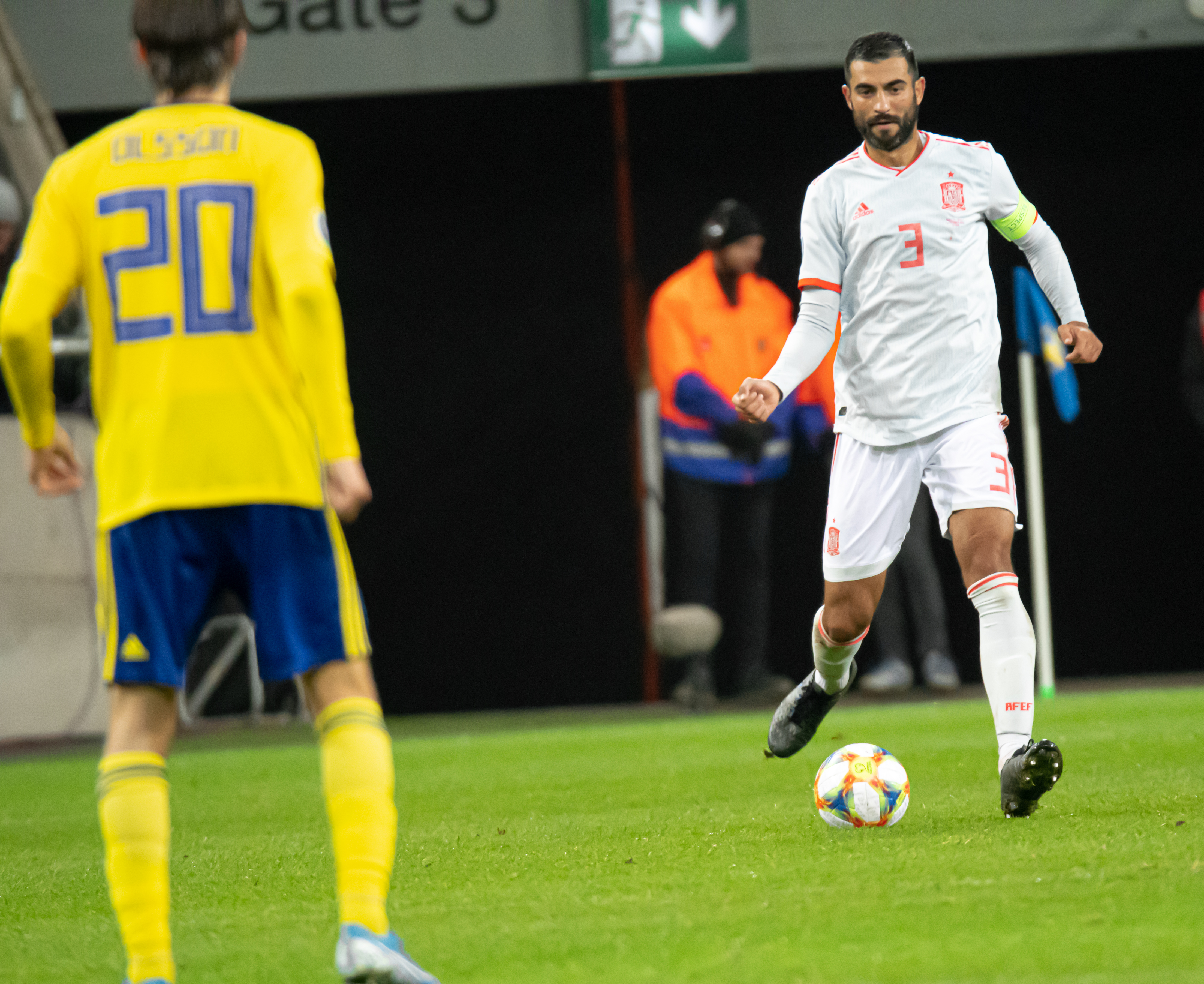 UEFA EURO qualifiers Sweden vs Spain 20191015